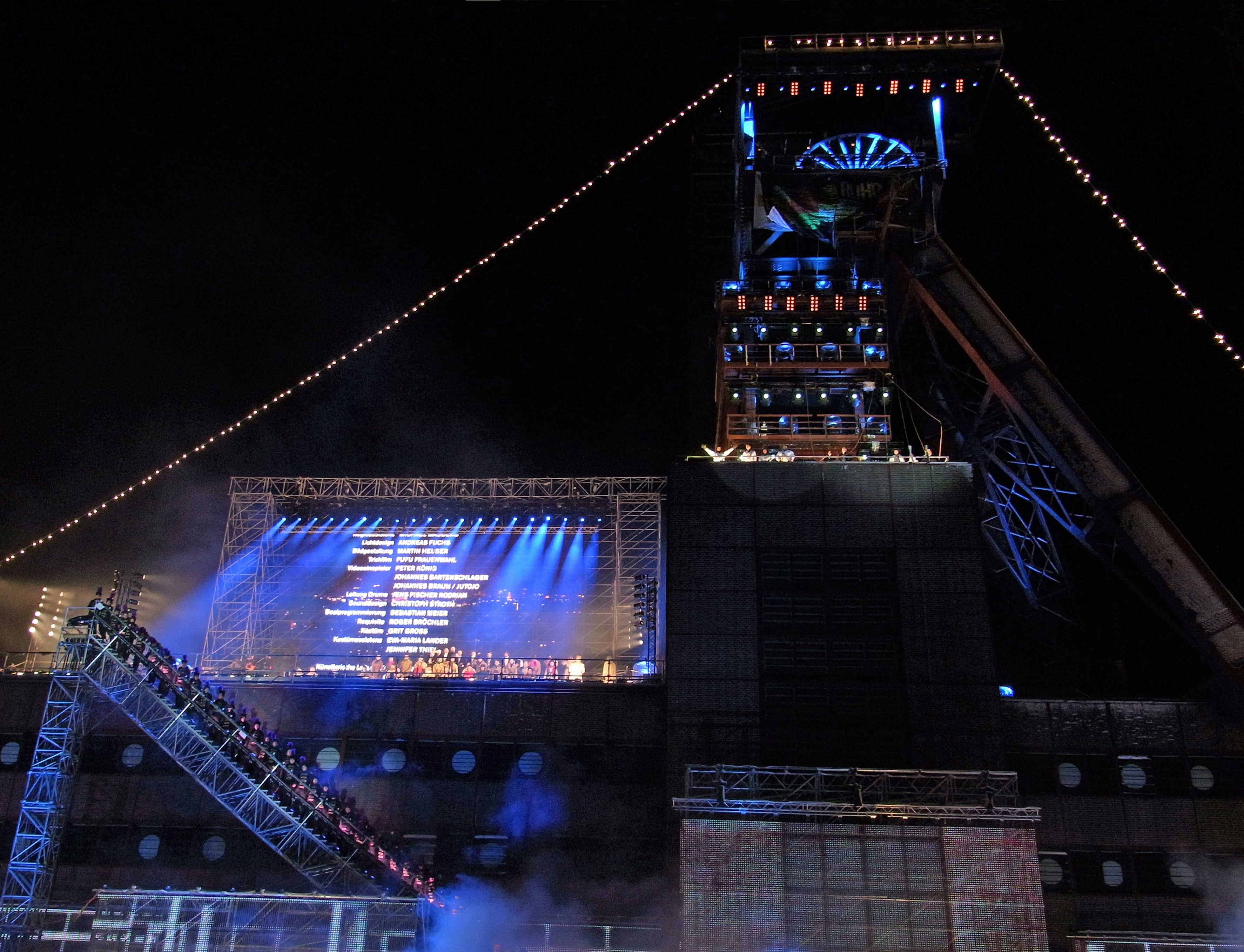 RUHR.2010 – Kulturhauptstadt Europas Ruhr.2010 - Das Finale Abschlussveranstaltung am 18. Dezember 2010 vor der Zeche Nordstern Abspann